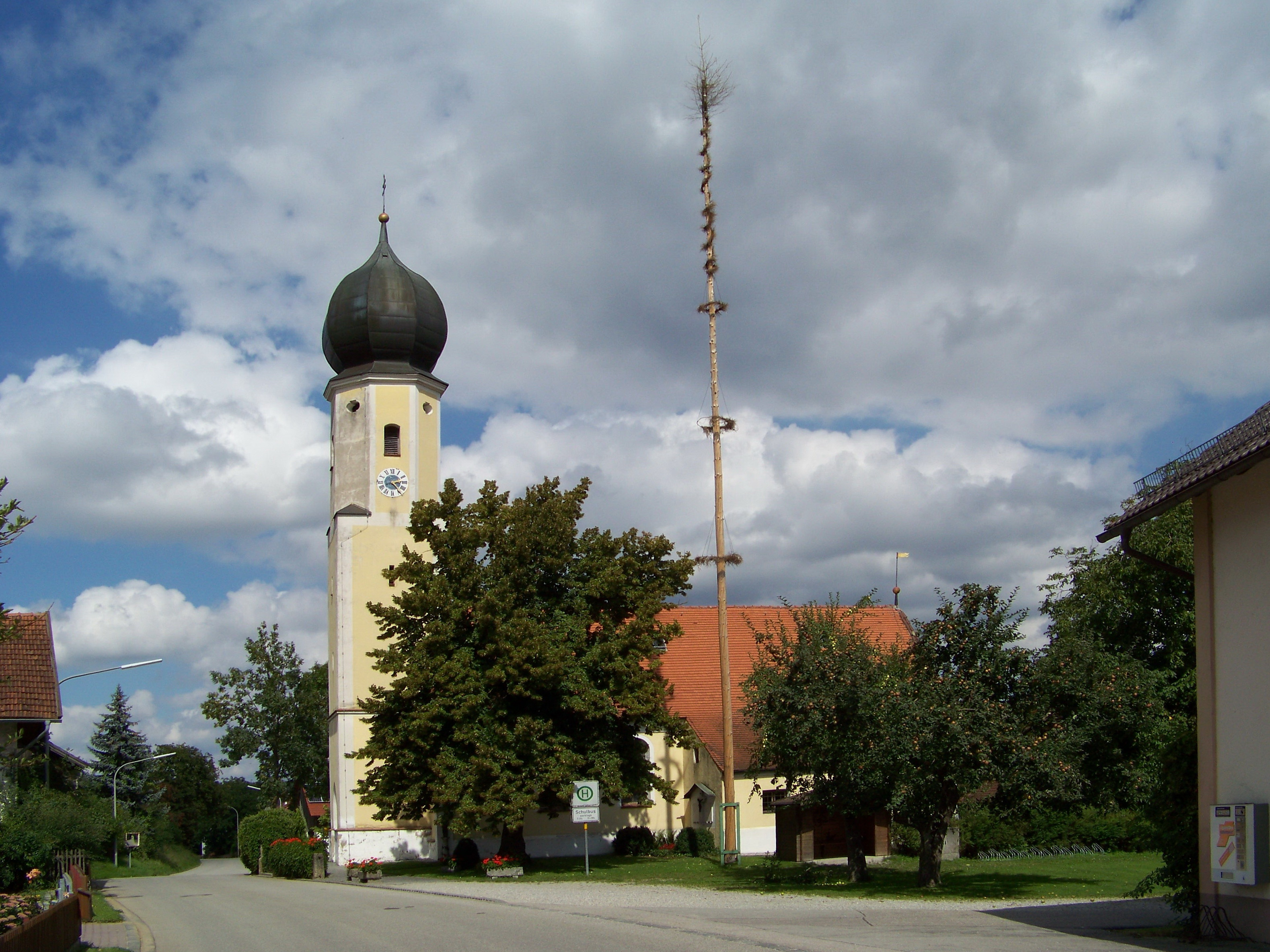 Weigendorf, Katholische Filialkirche St. Leonhard, barocker Saalbau mit nicht eingezogenem Chor, Südsakristei und Westturm, im Kern wohl romanisch; mit Ausstattung.